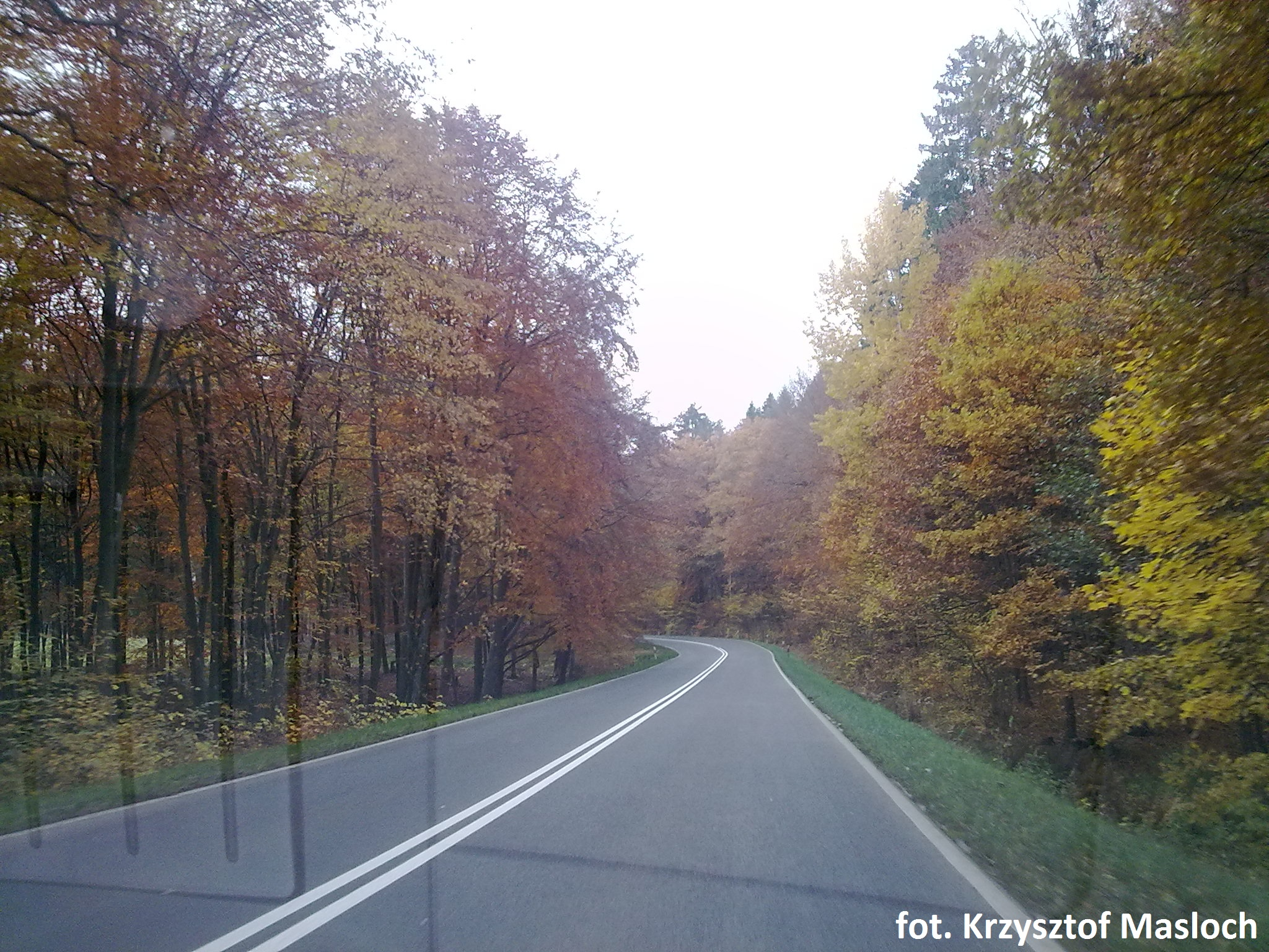 Droga Krajowa nr 20, Przęsin, 77-200 Miastko